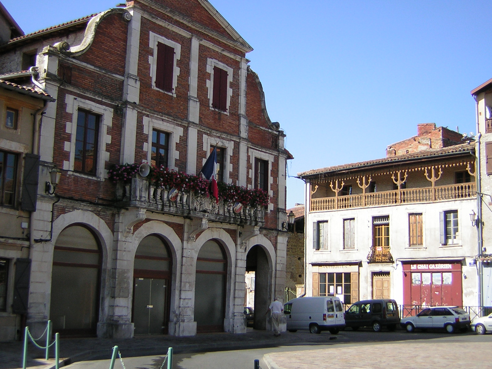 Mairie de Cazères (Haute-Garonne, France).